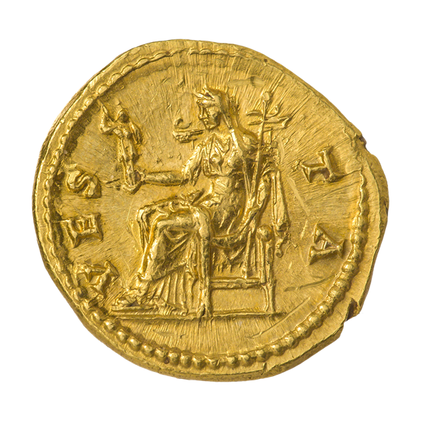 Ауреус. Сабина. Ок. 128—136 гг. (реверс). Надпись VESTA. Веста (покровительница семейного очага) сидит на троне, влево; на голове накидка; в руках Палладий (статуэтка Афины Паллады) и скипетр.